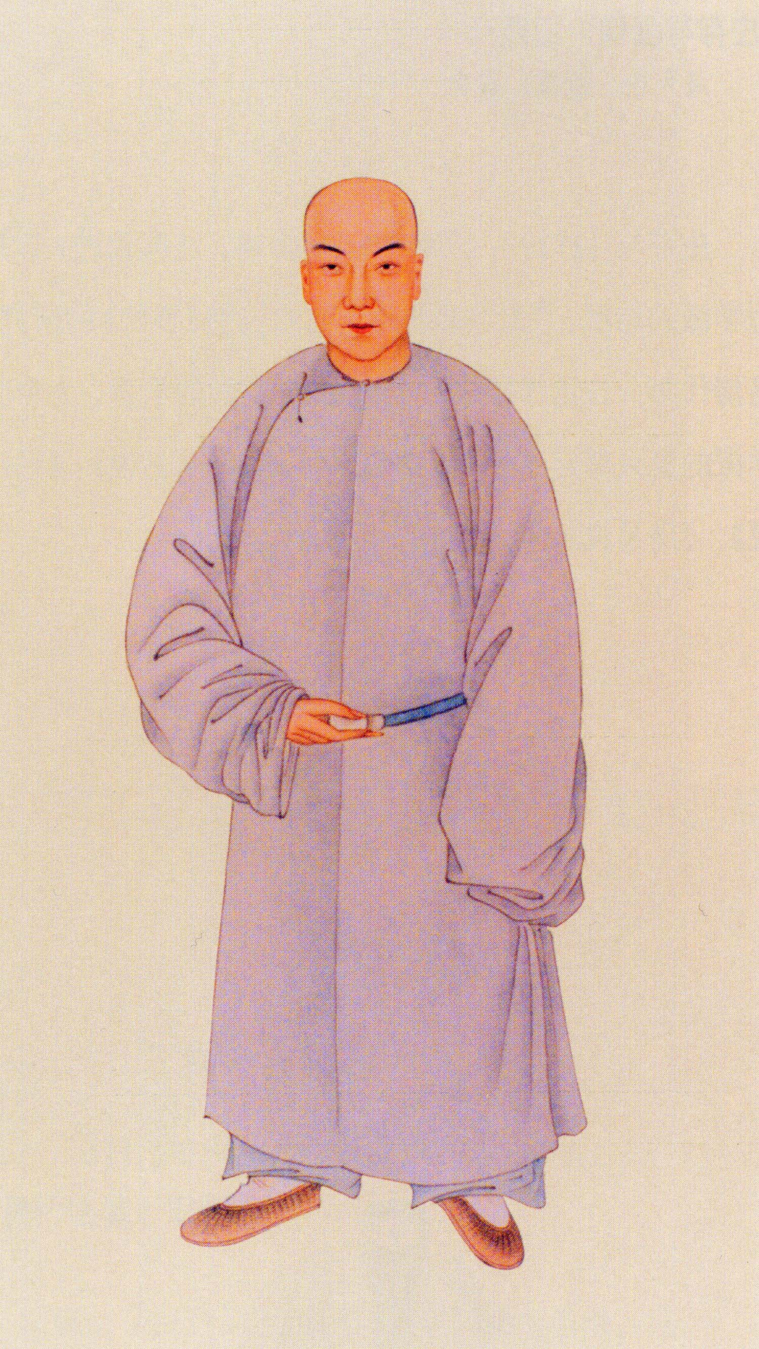 孔广森，清代学者。Kong Guangsen